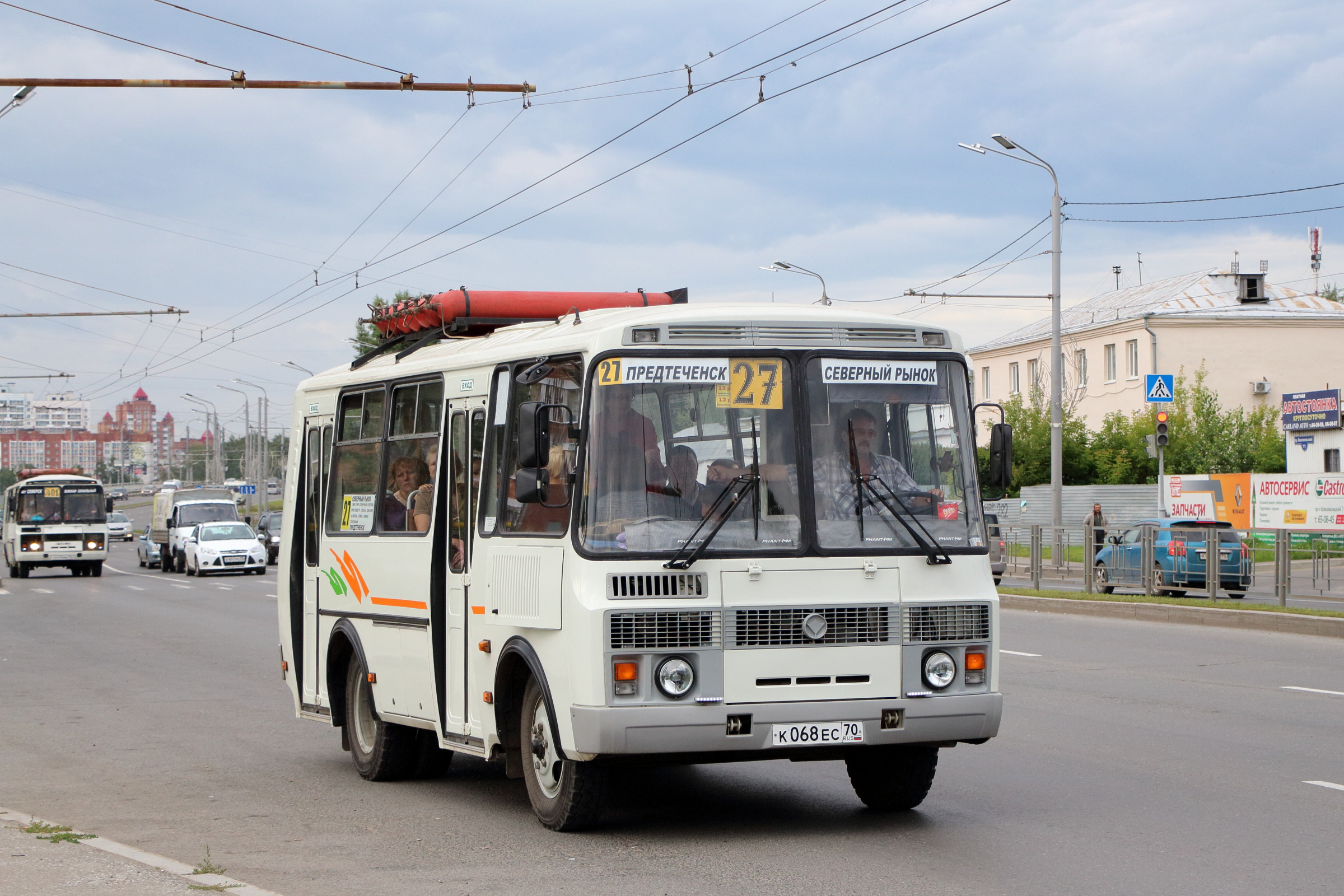 Автобус маршрута 27 на Комсомольском проспекте в Томске.